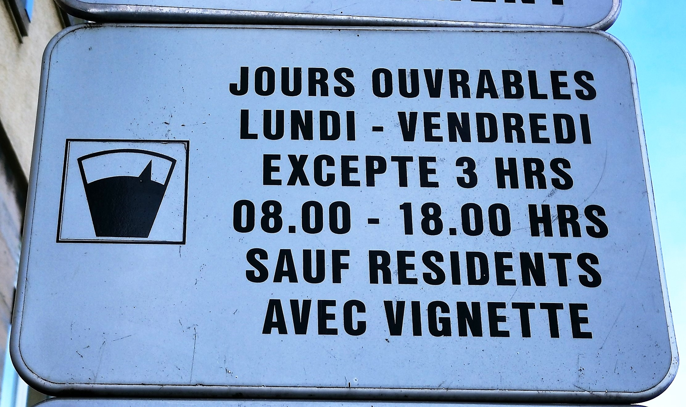 Signal routier "modèle 7c" du Code de la Route luxembourgeois. Obligation de payer une taxe de stationnement.